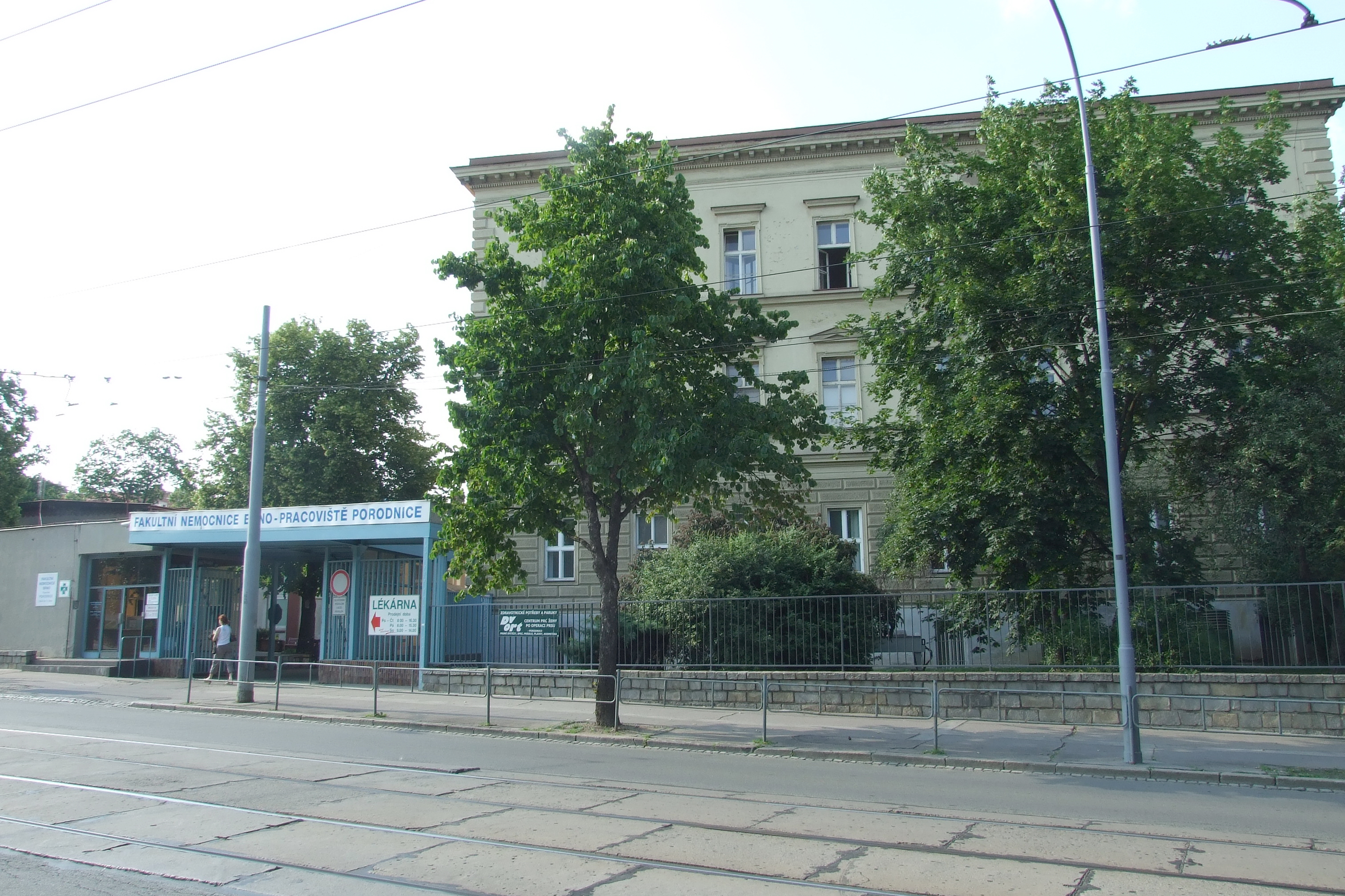 Brno-Veveří - porodnice na Obilním trhu